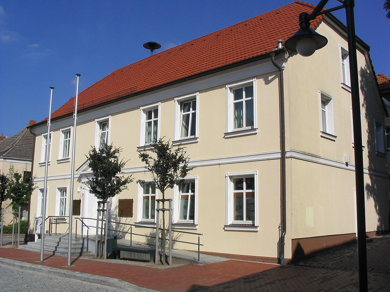 Rathaus (und gleichzeitig Frisörsalon)